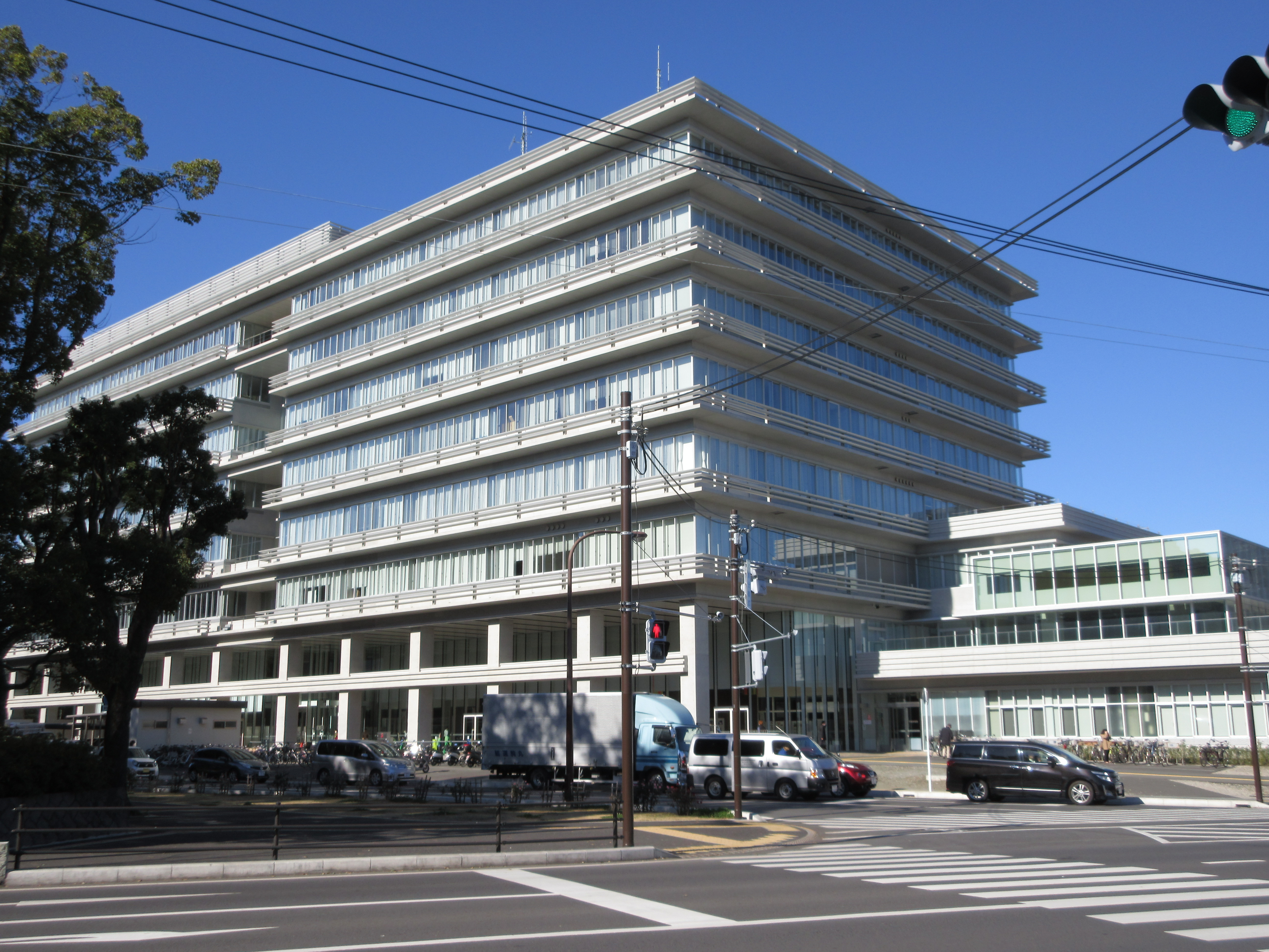 平塚市役所本館（2015年12月18日撮影）